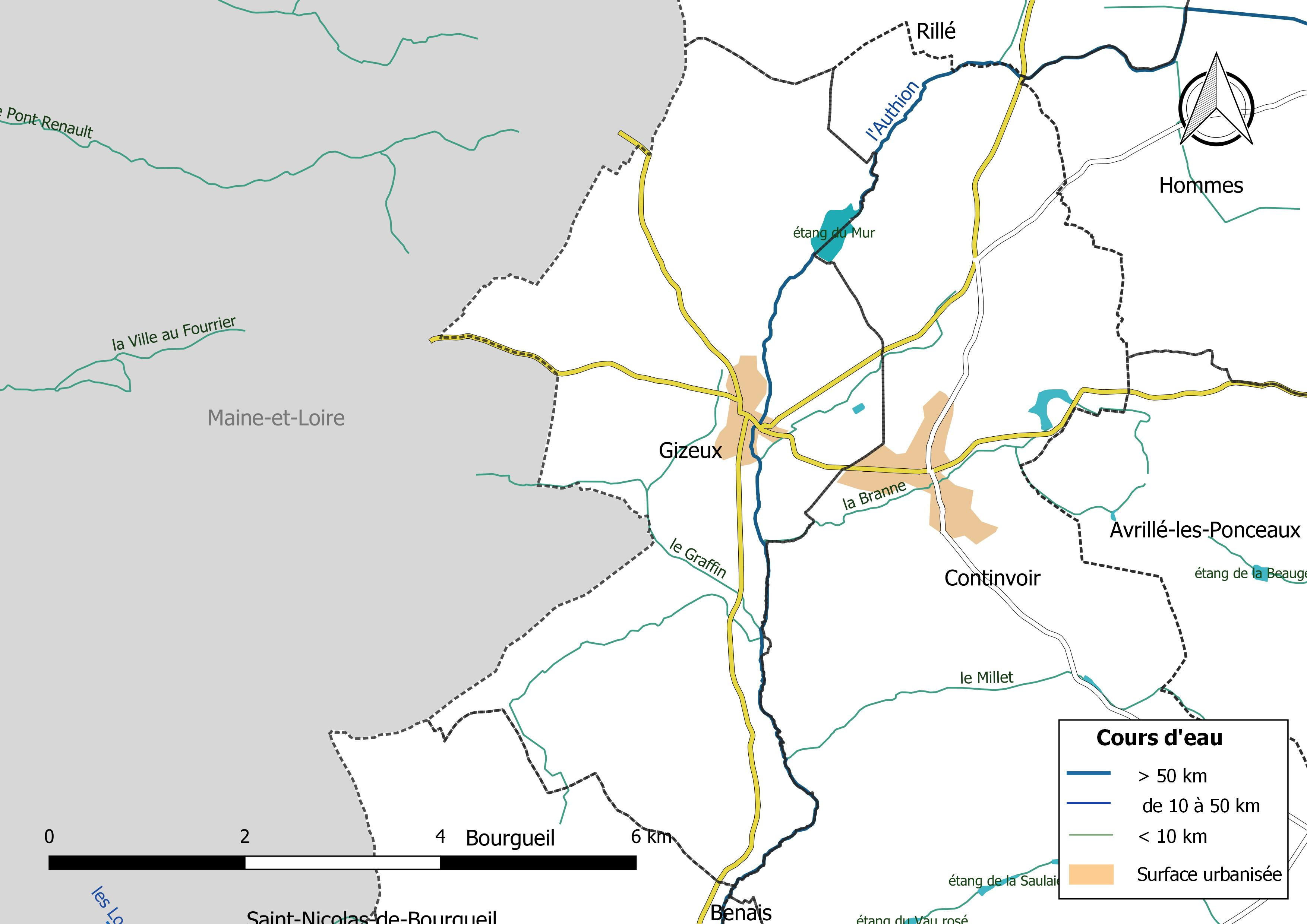 Carte du réseau hydrographique de la commune de Gizeux (France).